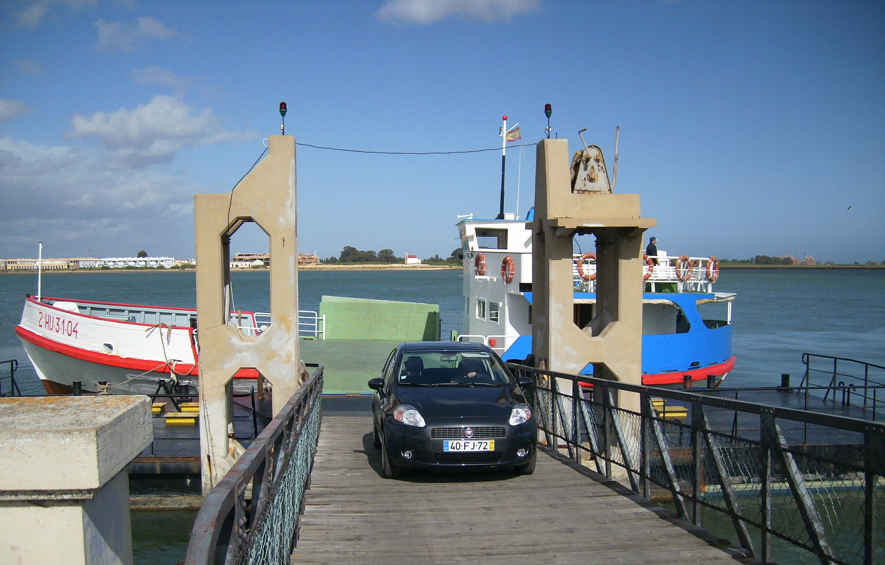 Fähre von Ayamonte nach Vila Real de Santo António / Ferry Ayamonte to Vila Real de Santo António